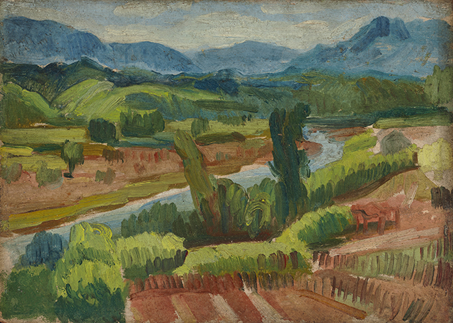 中文（台灣）: 李梅樹作品：遠眺大豹山，年代不詳，油彩、木板。